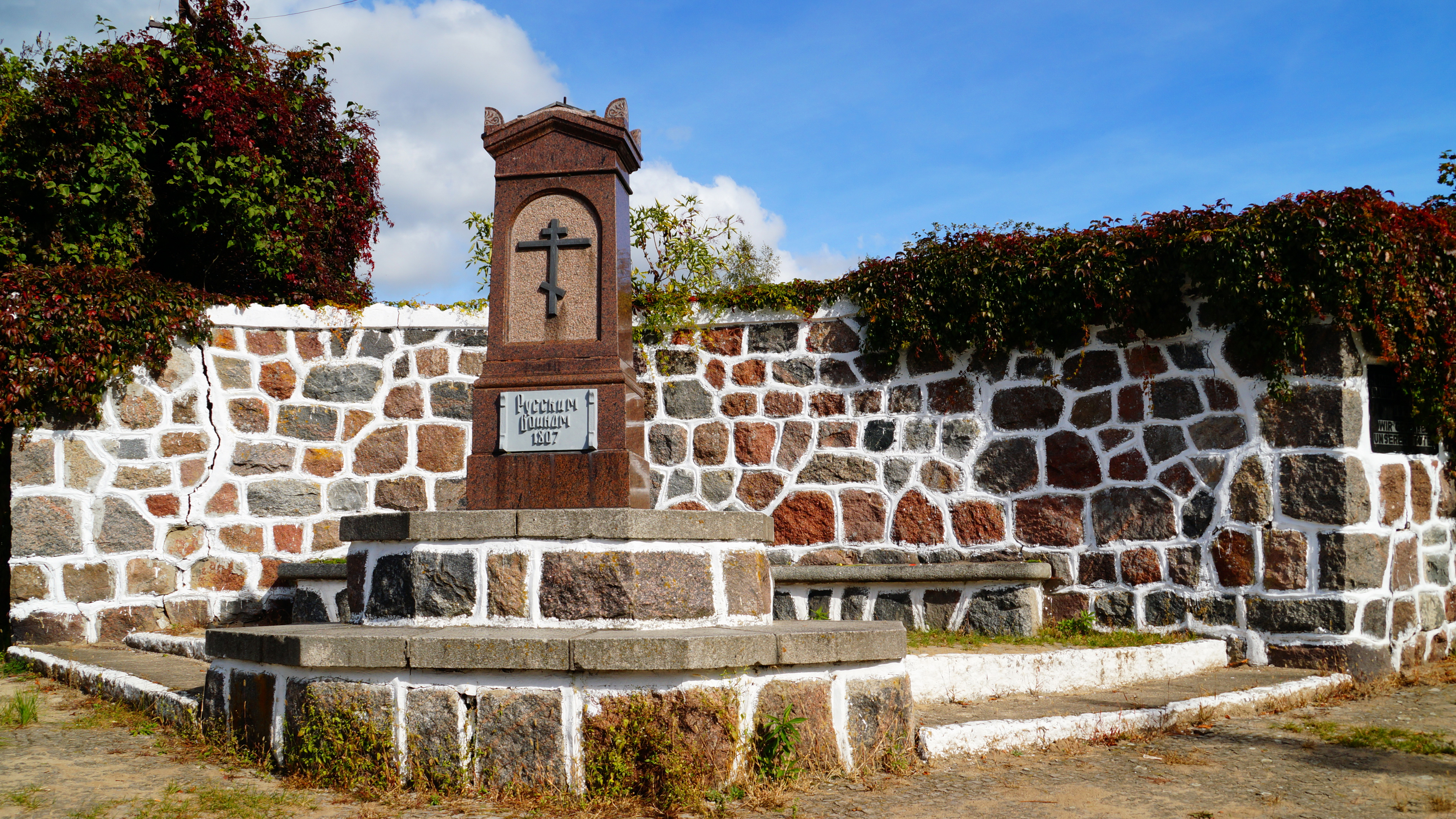 Памятник жителям города Домнау - жертвам Первой Мировой войны 1914-18 гг. с установленным на нём памятным знаком русским воинам 1807 года: улица Садовая, Домново, Правдинский район, Калининградская область